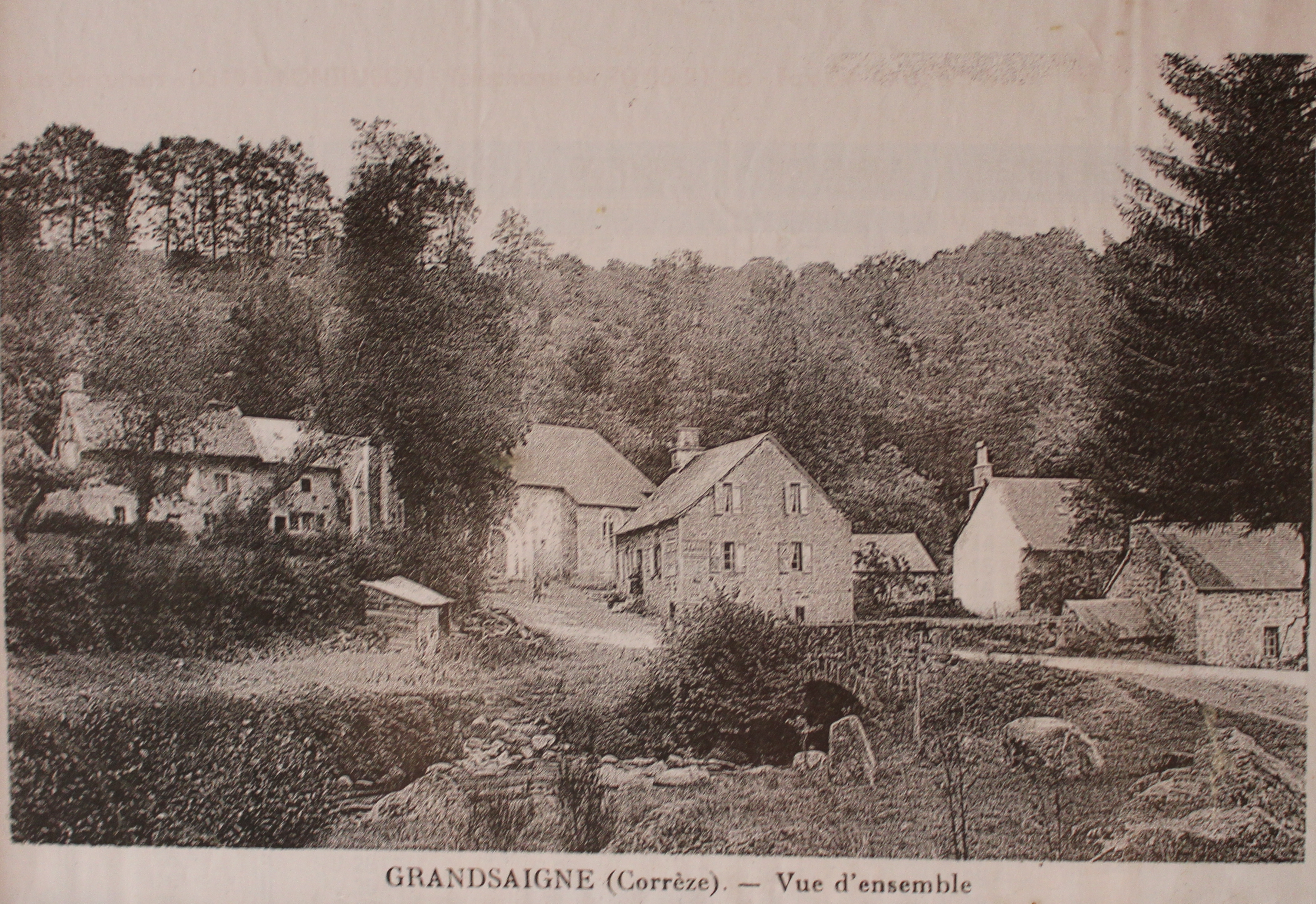 Vue du village vers 1910